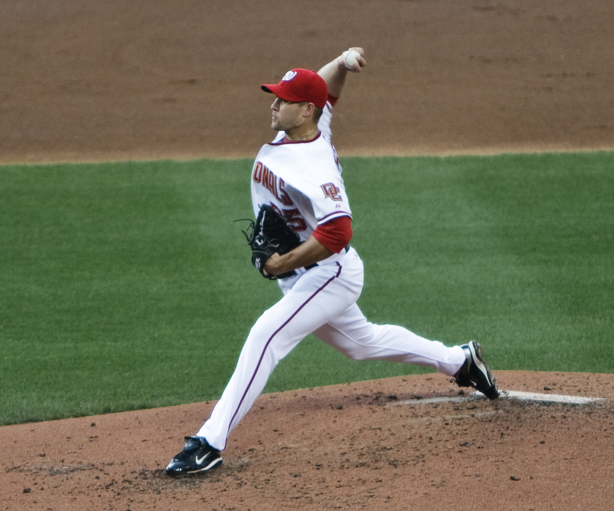 Craig Stammen